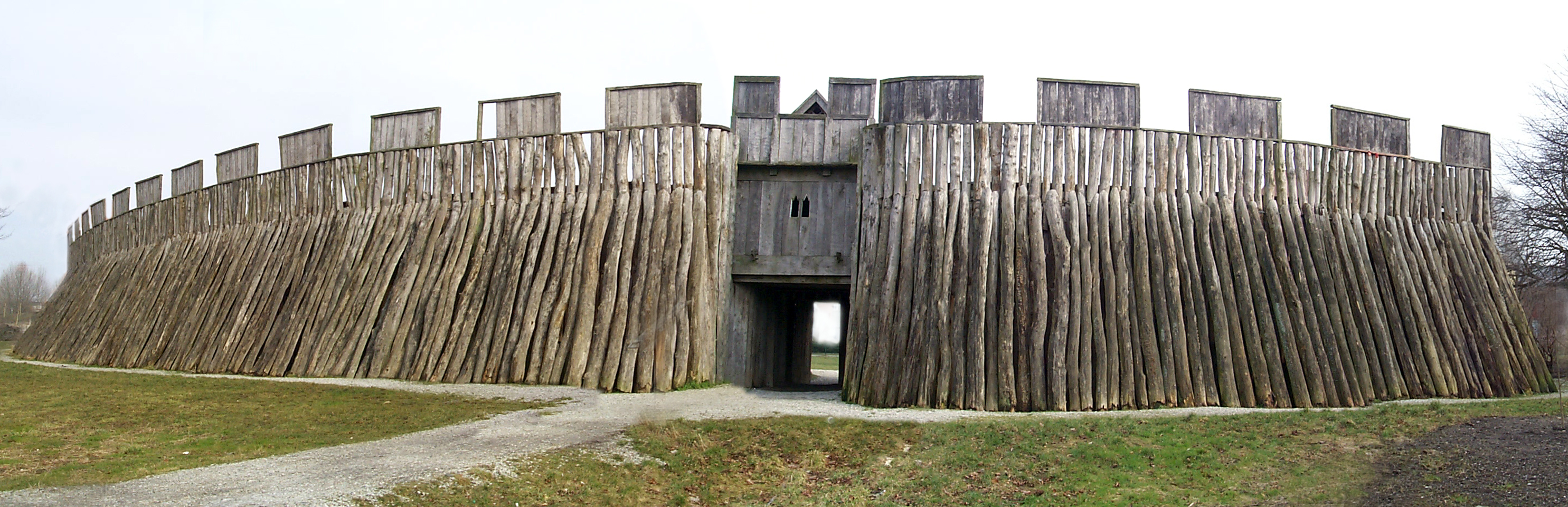 Den rekonstruerade vikingaborgen i Trelleborg, Sverige.